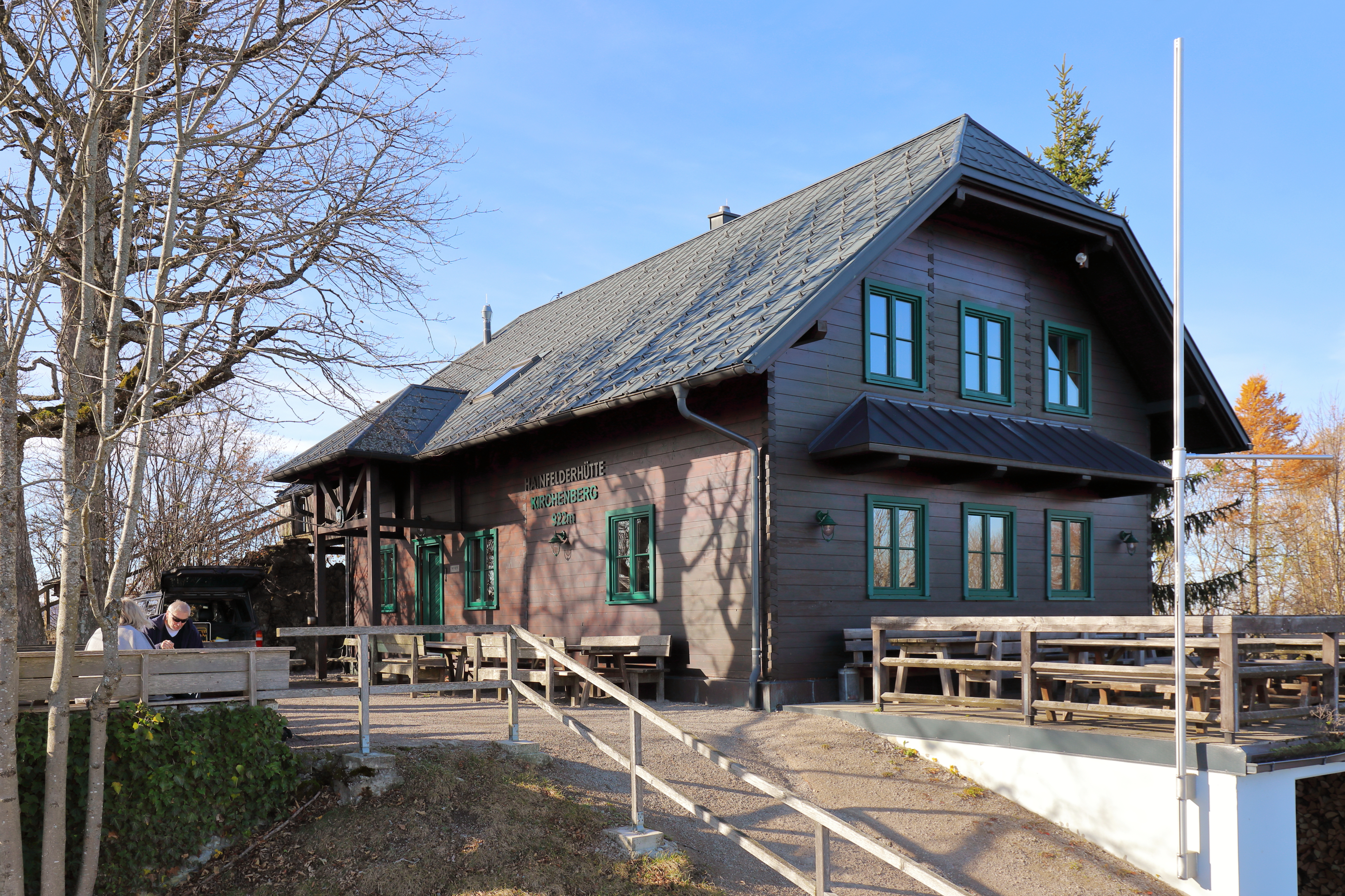 Ostansicht der Hainfelder Hütte des Österreichischen Touristenklubs auf dem Gipfel des 924 m hohen Kirchenberg in der niederösterreichischen Stadtgemeinde Hainfeld.Ursprünglich wurde im Jahre 1915 unter einer bestehenden Aussichtswarte eine kleine Hütte mit rd. 15 m² errichtet. 1925 erfolgte ein Neubau mit rd. 65 m² und Sitzplätze für 30 Gäste, der 1999 an das Stromnetz der EVN angeschlossen wurde. Dieser Bau wurde wiederum durch einen am 25. September 2005 eröffneten Neubau ersetzt. Sie bietet Platz für 40 Personen in der Hütte und 70 im Gastgarten und ist ganzjährig an den Wochenenden bewirtschaftet.